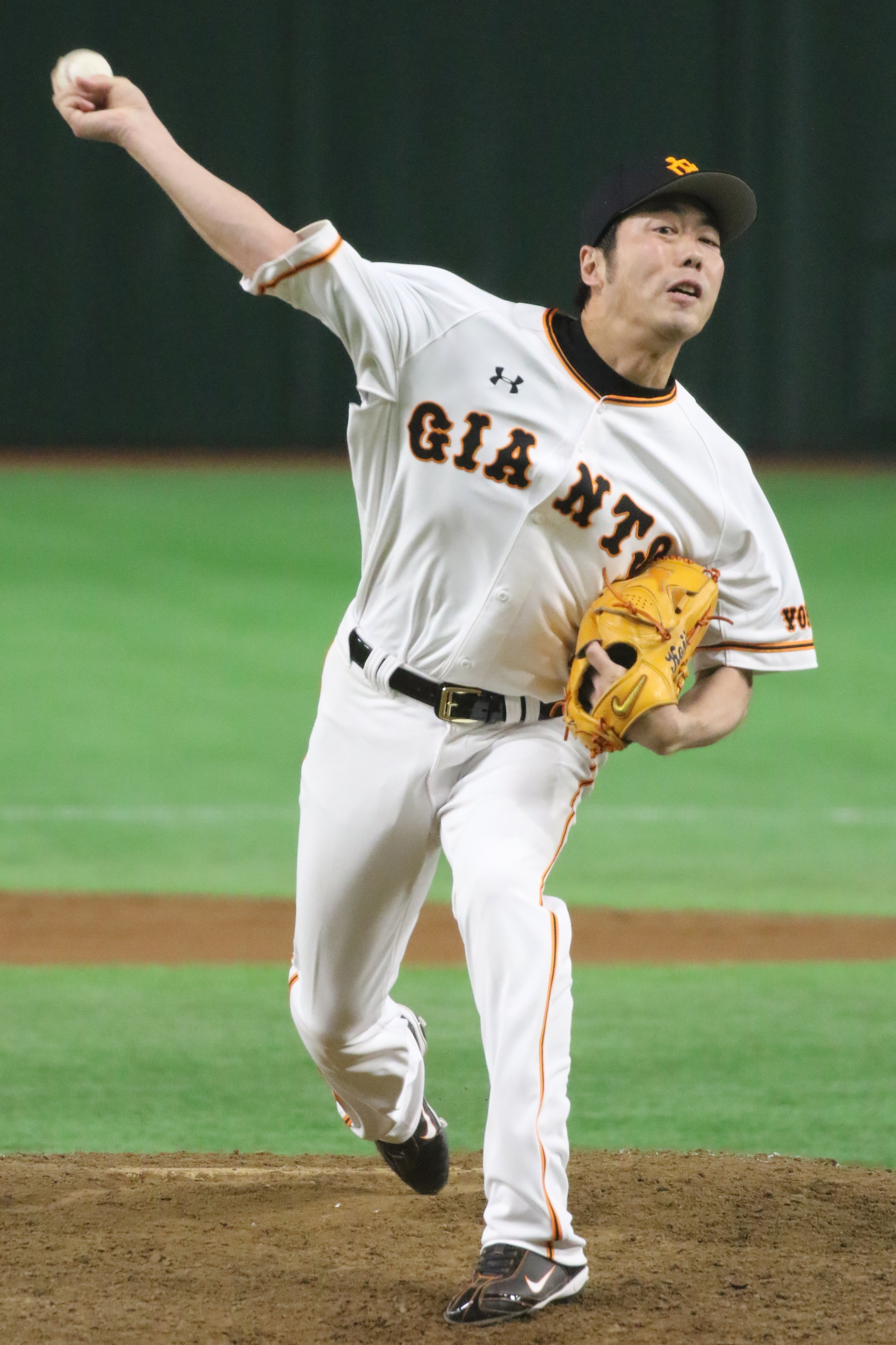 ジャイアンツ上原投手